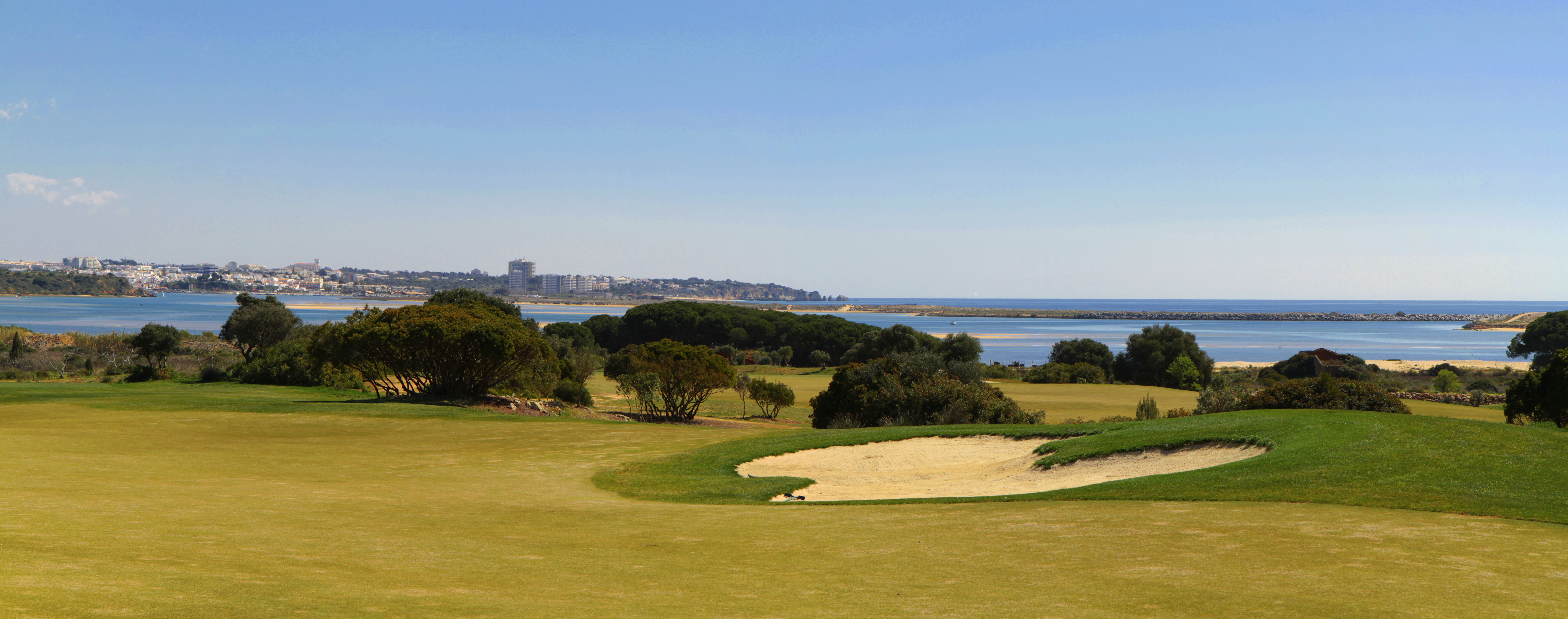 Golf porugal Algarve